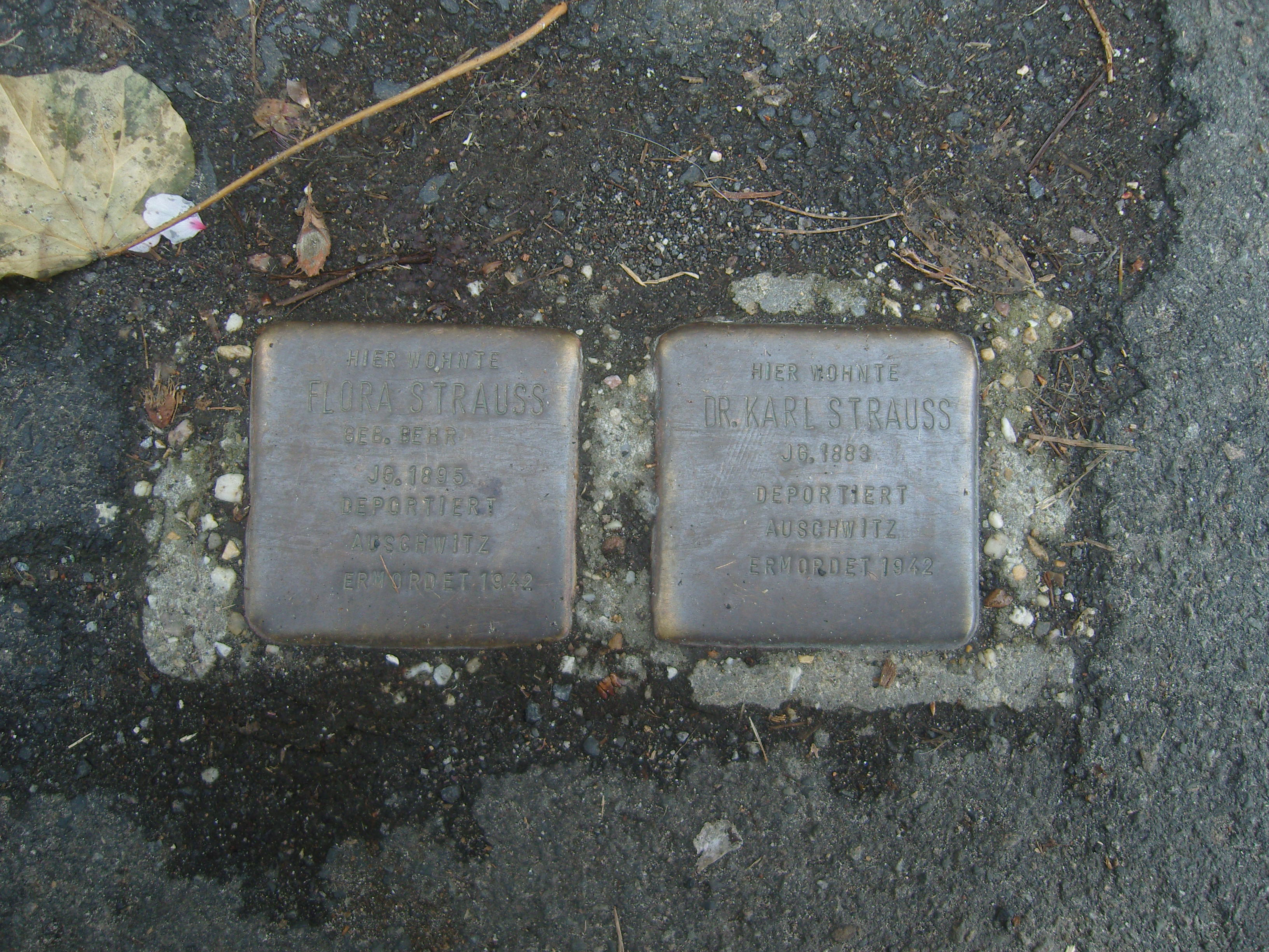 Stolpersteine im Gedenken an Flora Strauss geborene Behr (siehe Gedenkbuch des Bundesarchivs [1]) und Dr. Karl Strauss (siehe Gedenkbuch des Bundesarchivs [2])